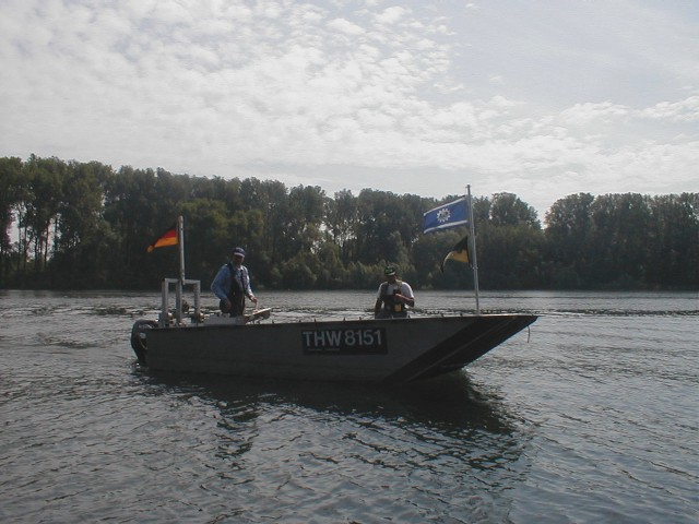 Mehrzweckponton des THW, selbst fotografiert